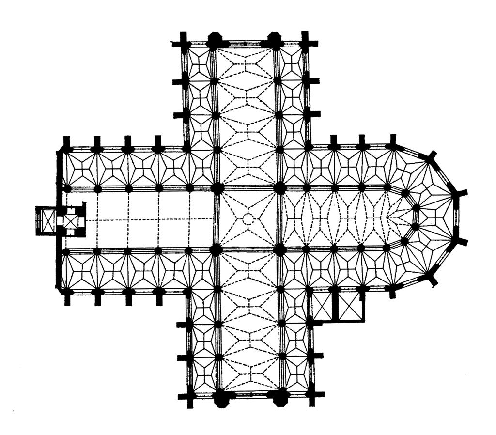 Grondplan Hooglandse Kerk Leiden. Eigen tekening.